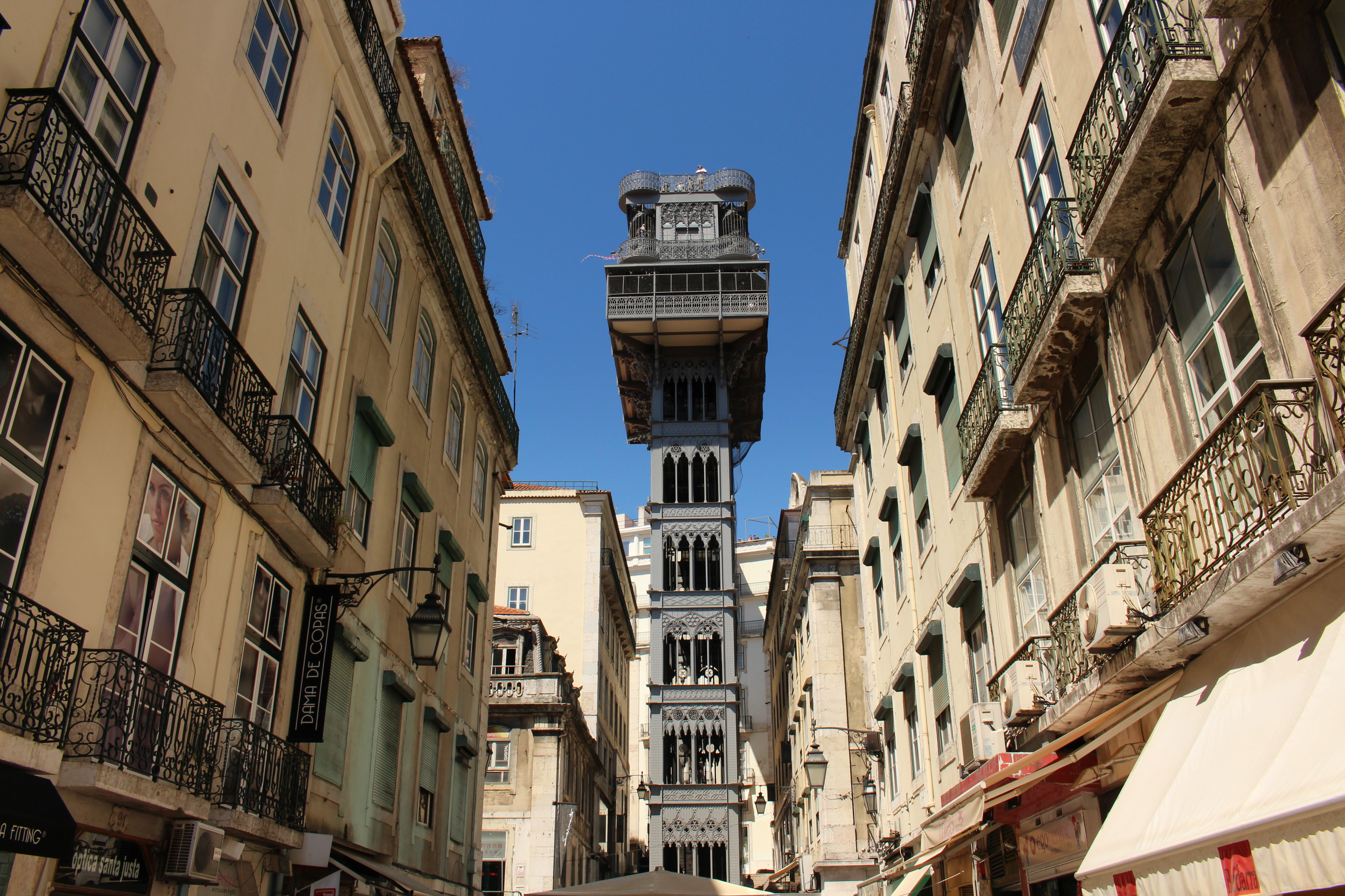 Elevador de Santa Justa